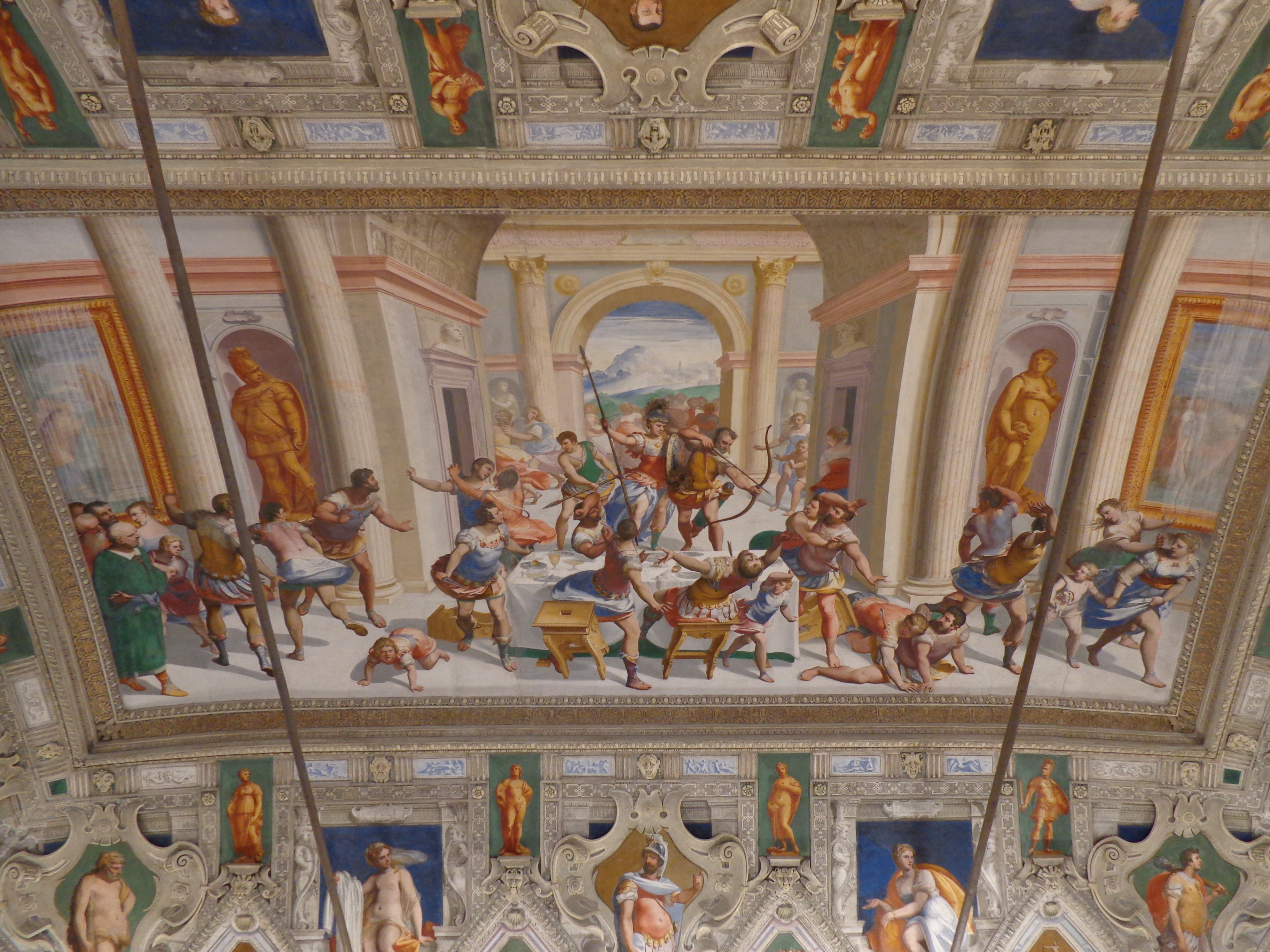 Ulisse saetta i Proci con l'aiuto di Minerva e di Telemaco